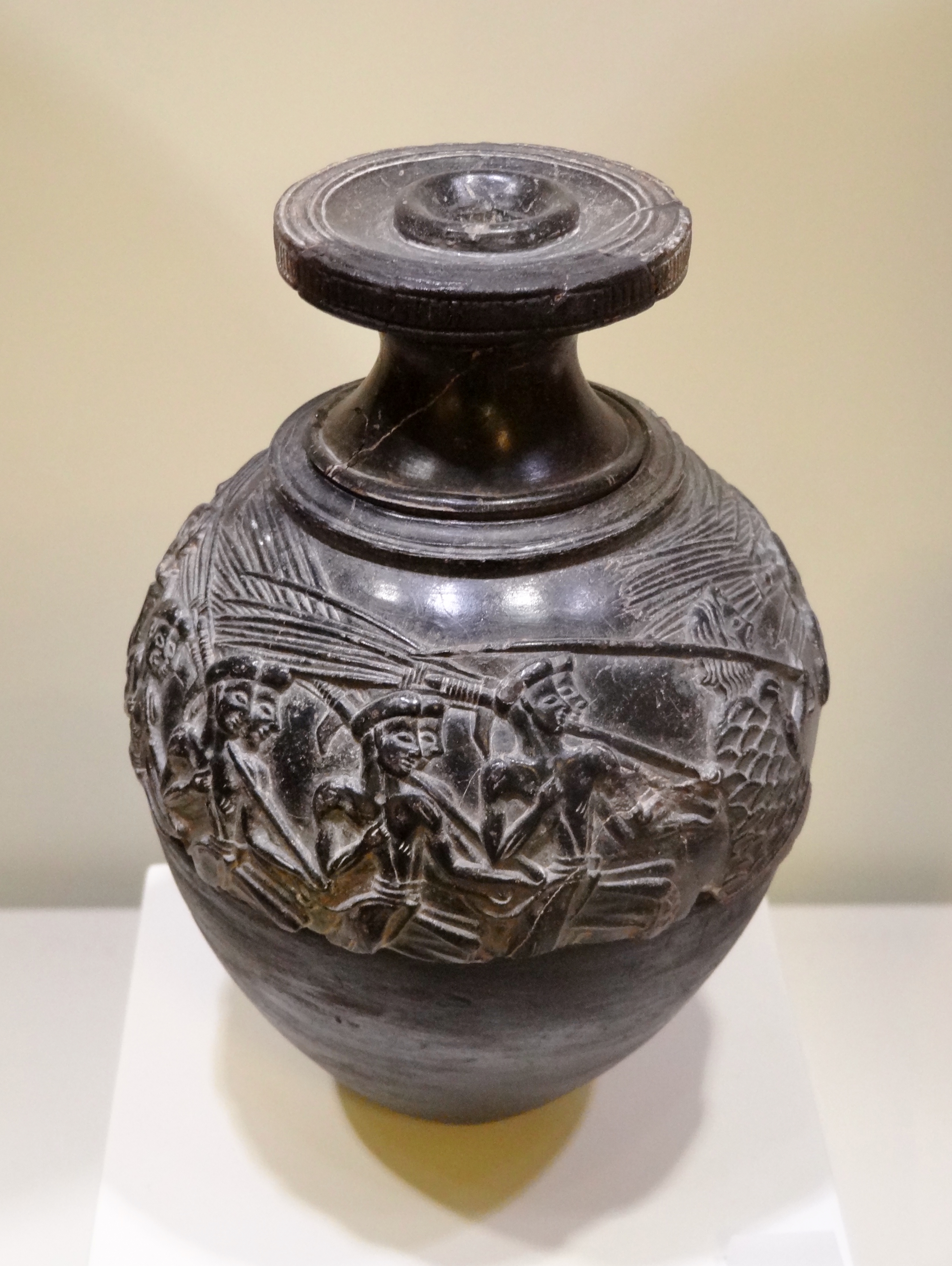 „Schnittervase“, Reliefrhyton aus Speckstein (Neupalastzeit 1500–1450 v. Chr.) aus Agia Triada, ausgestellt im Archäologischen Museum Iraklio, Kreta, Griechenland